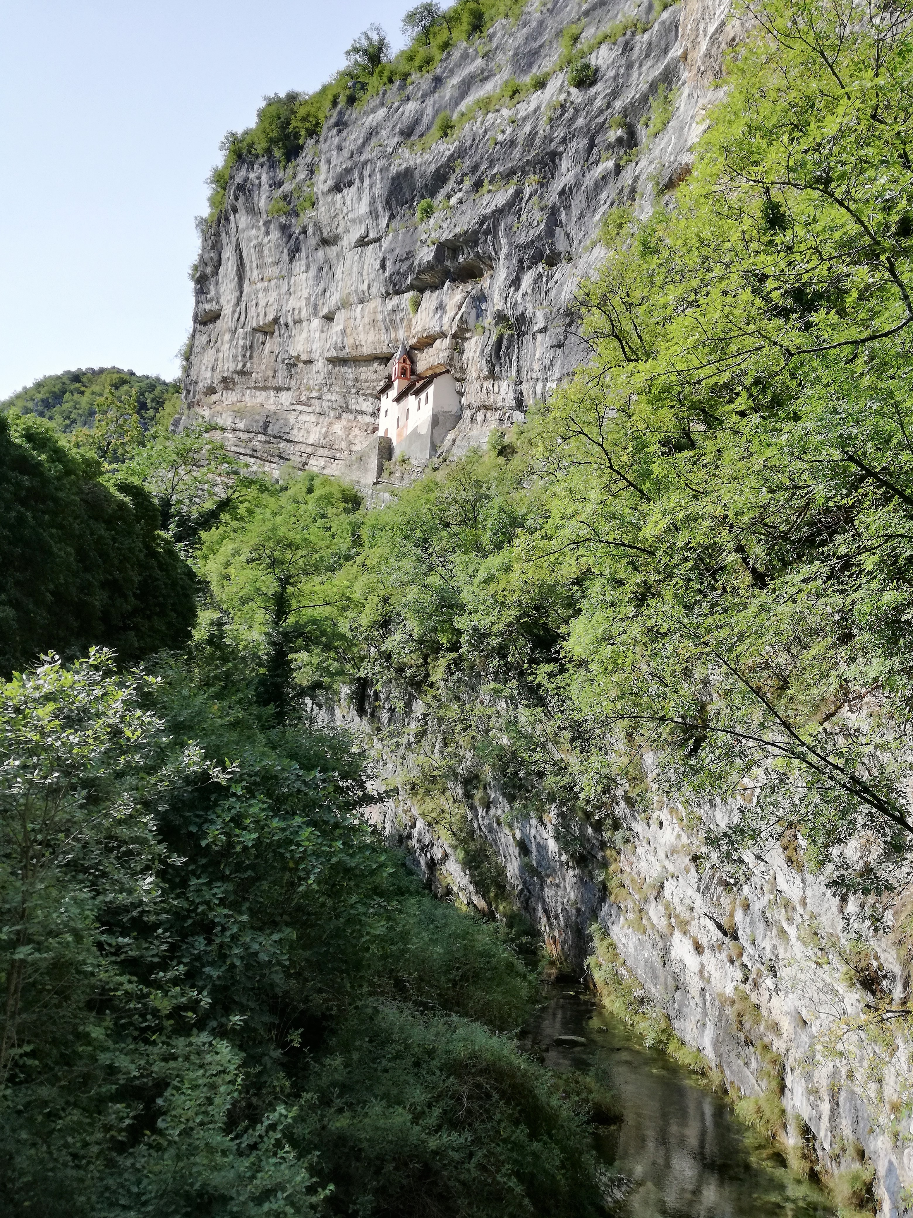 San Colombano vom Torrente Leno aus